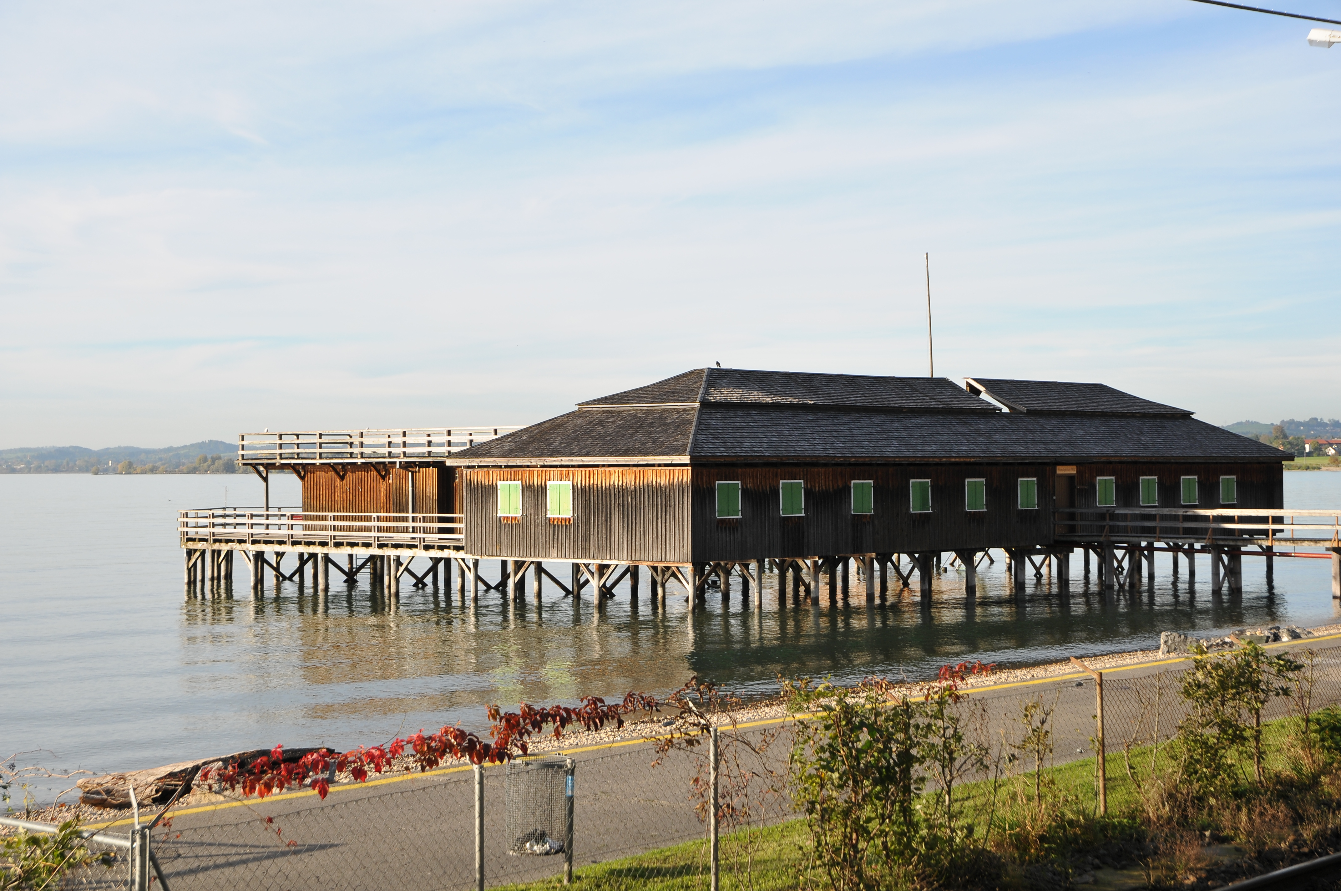 Ehemals Militärbad (Mili) an der Reichsstraße in Bregenz.